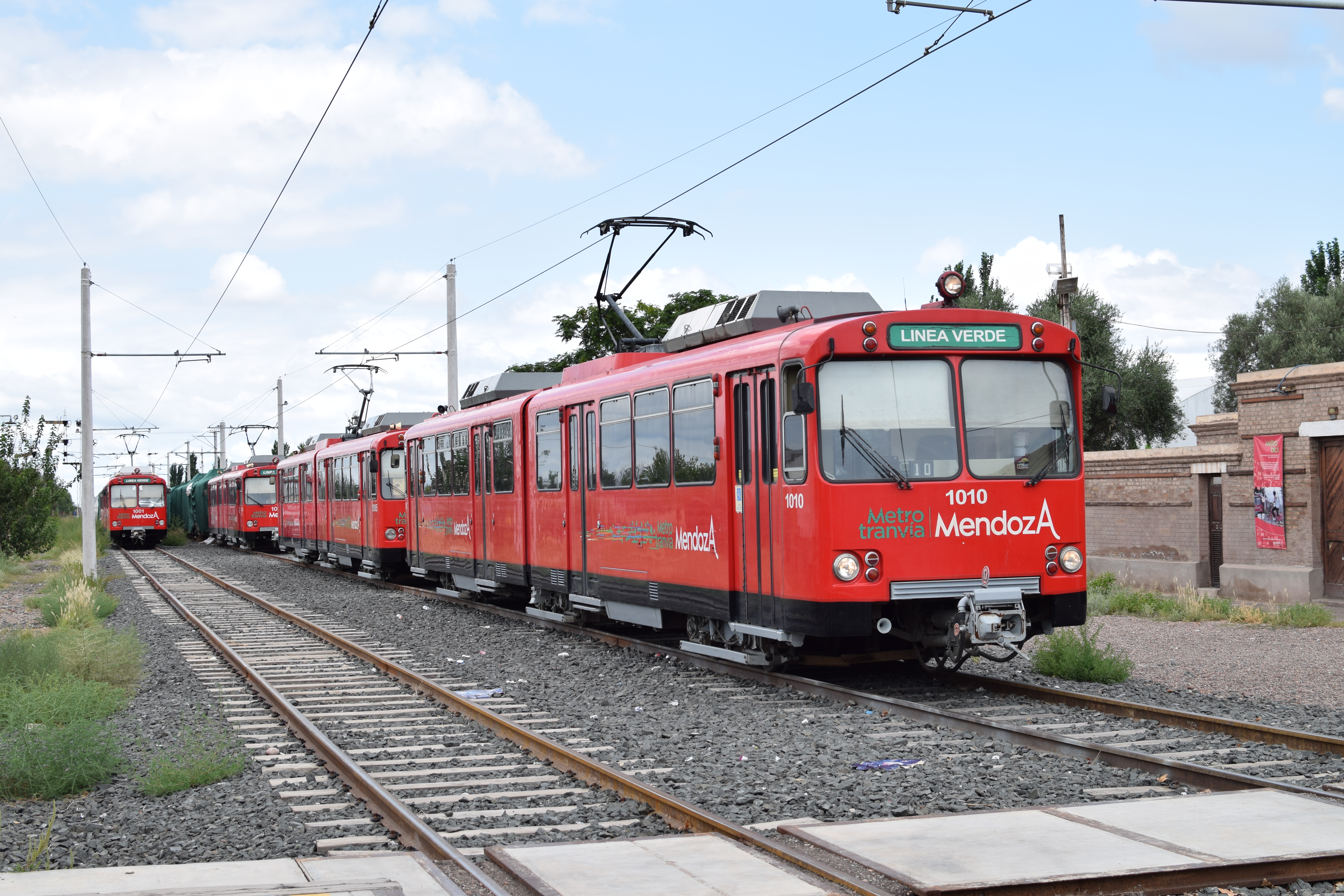 Siemens–Duewag U2 en el Parador Gutierrez.